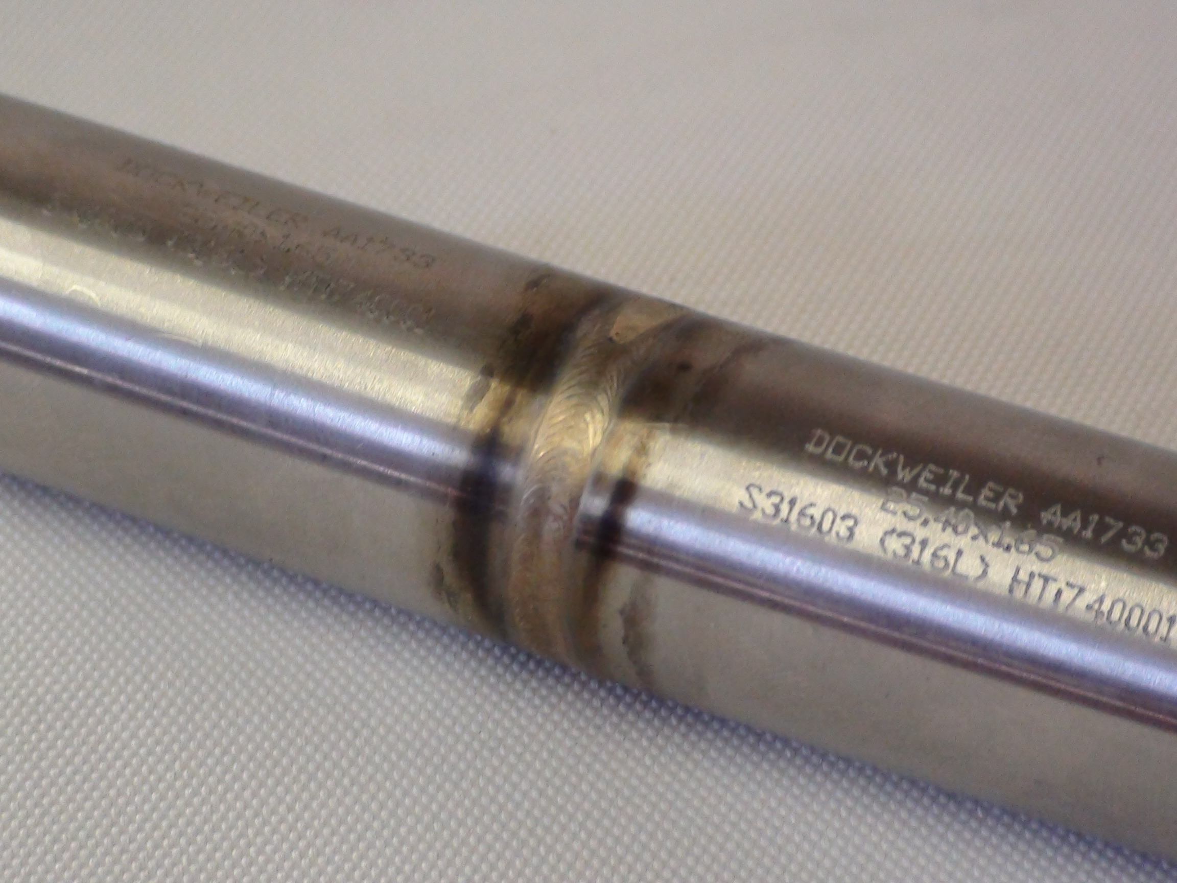 TIG var.